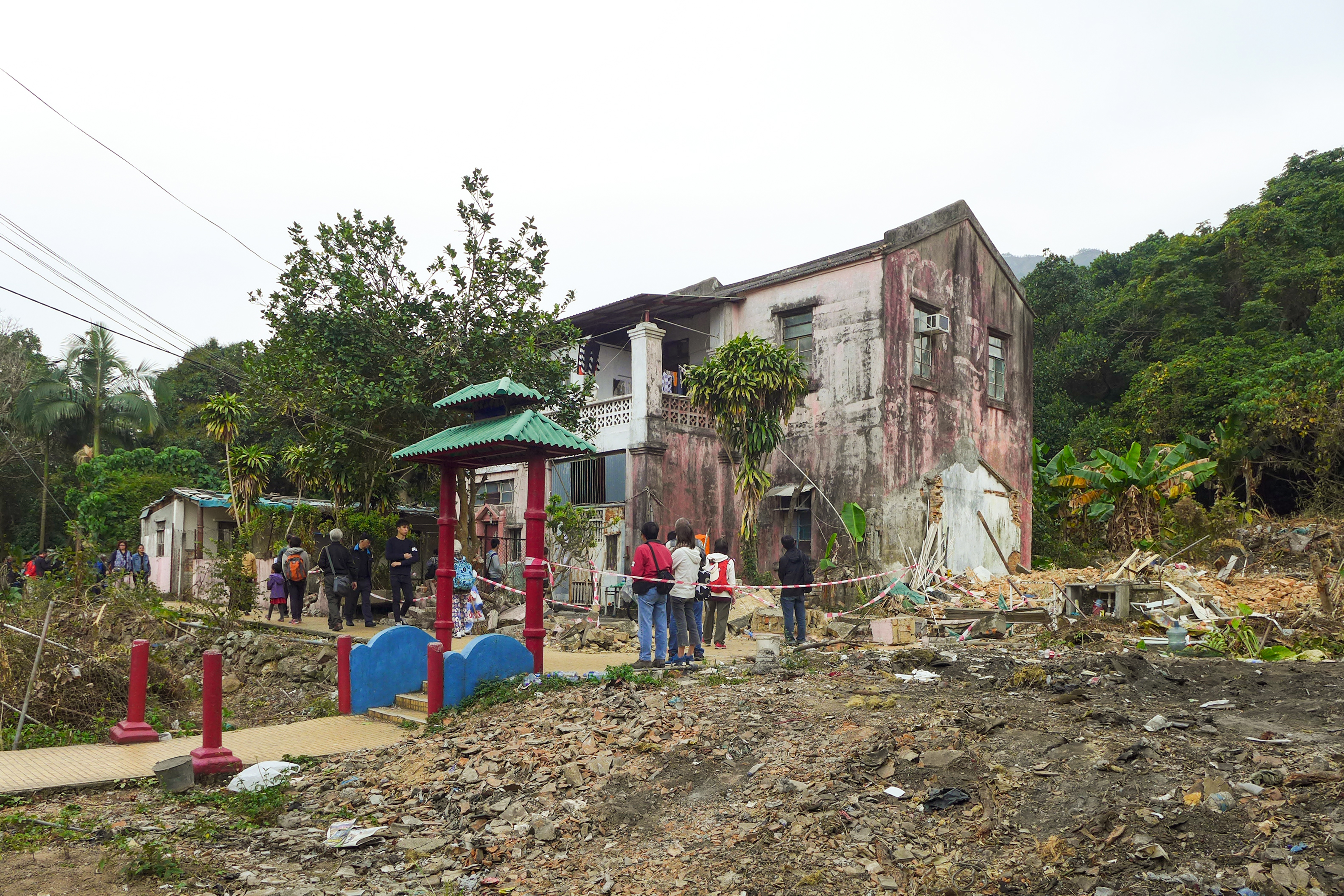 Hung Lau under damage